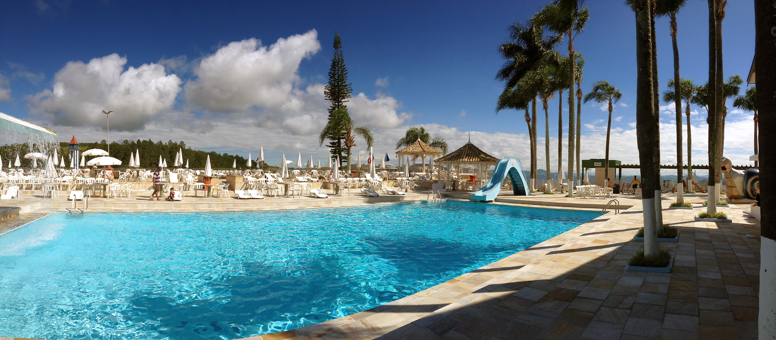 VALE DO SOL - SERRA NEGRA